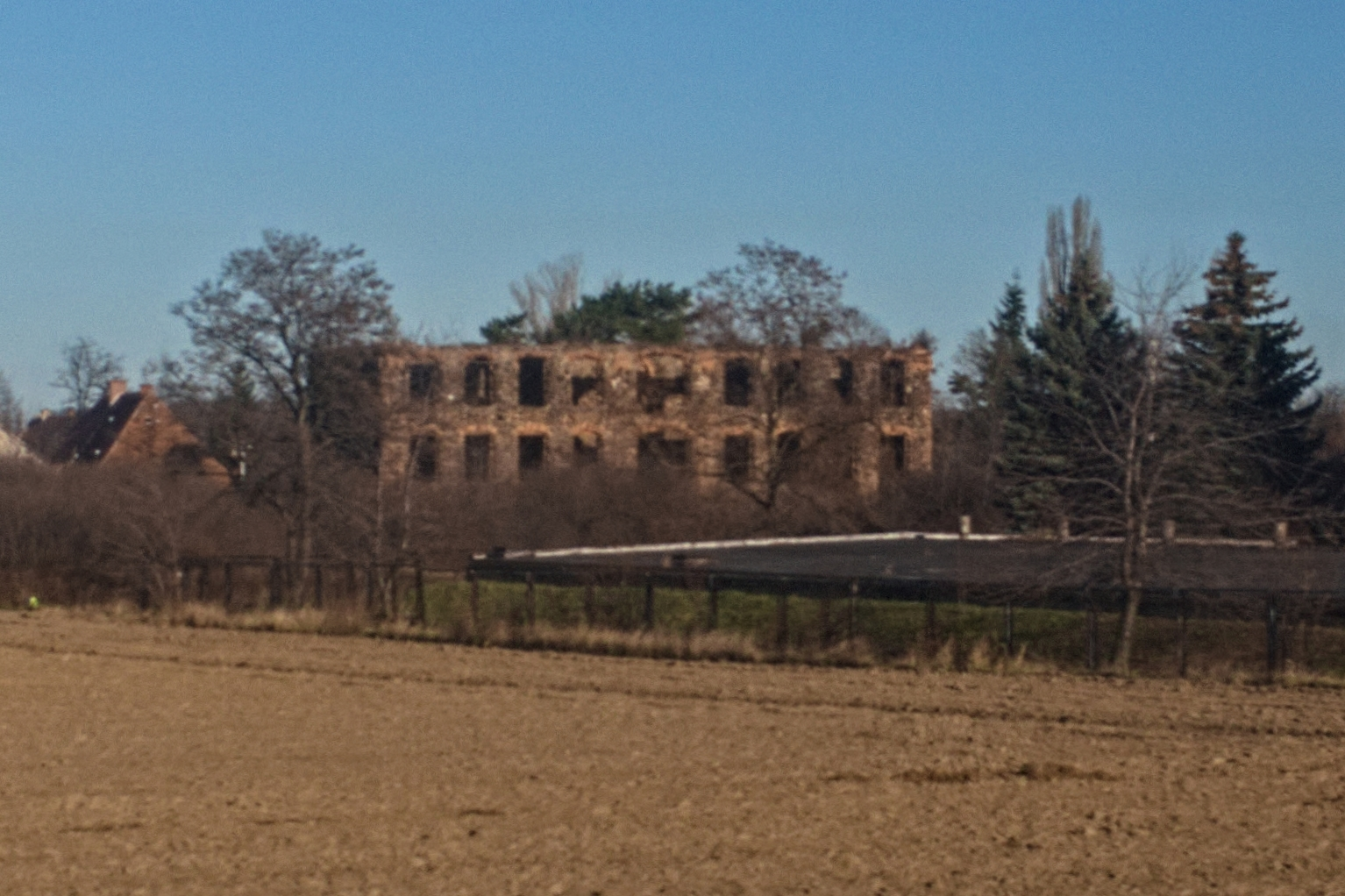 ruiny pałacu w Świebodzicach-Cierniach, widok od południa z okna pociągu do Wrocławia